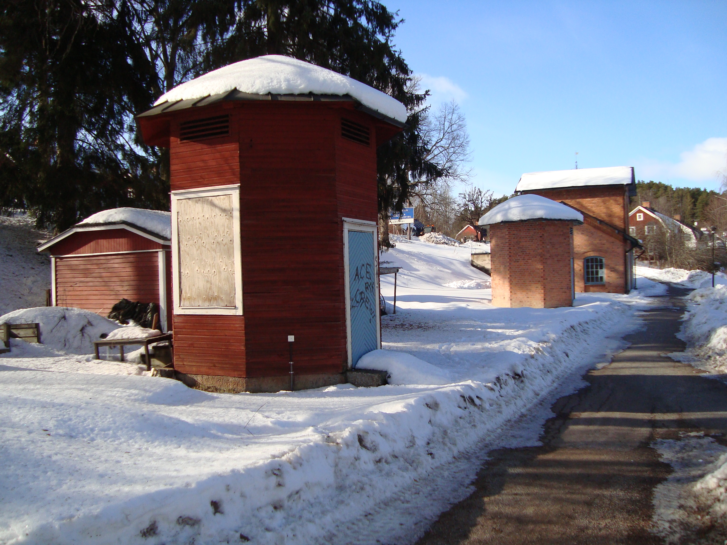 El- och vattenverket Petersburg, intill Gammelgården, Hedemora, Sverige